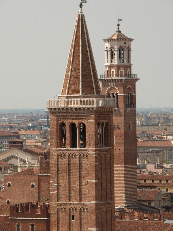 Original image description from the Deutsche Fotothek Turm der Kirche San Anastasia (vorn), dahinter Torre dei Lamberti